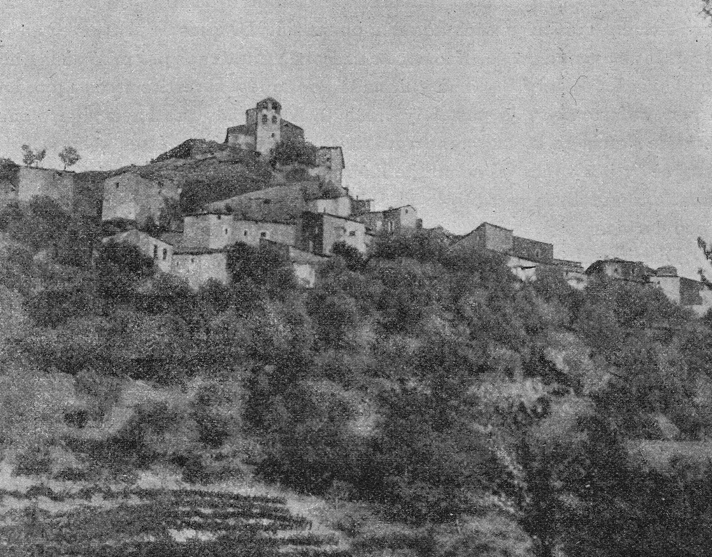 Imatge d'Aramunt vell presa per Ceferí Rocafort vers 1912 (Aramunt, Conca de Dalt, Pallars Jussà)